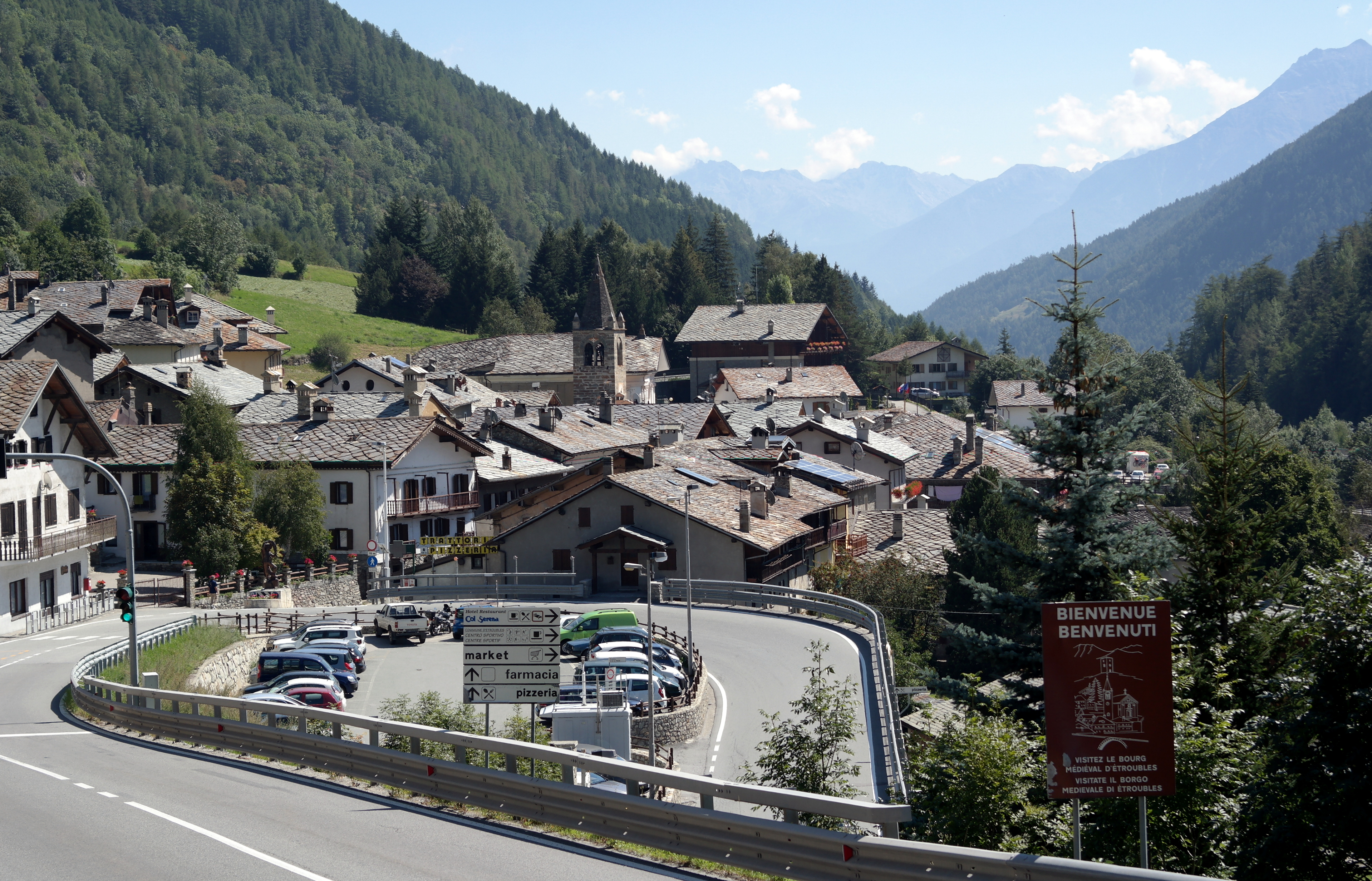 panorama di Etroubles